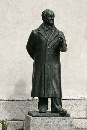 Murten: Denkmal von Jeremias Gotthelf (Deutsche Kirche)